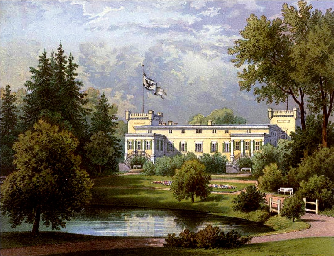 Gut Schoetzow, Kreis Fürstenthum, Provinz Pommern